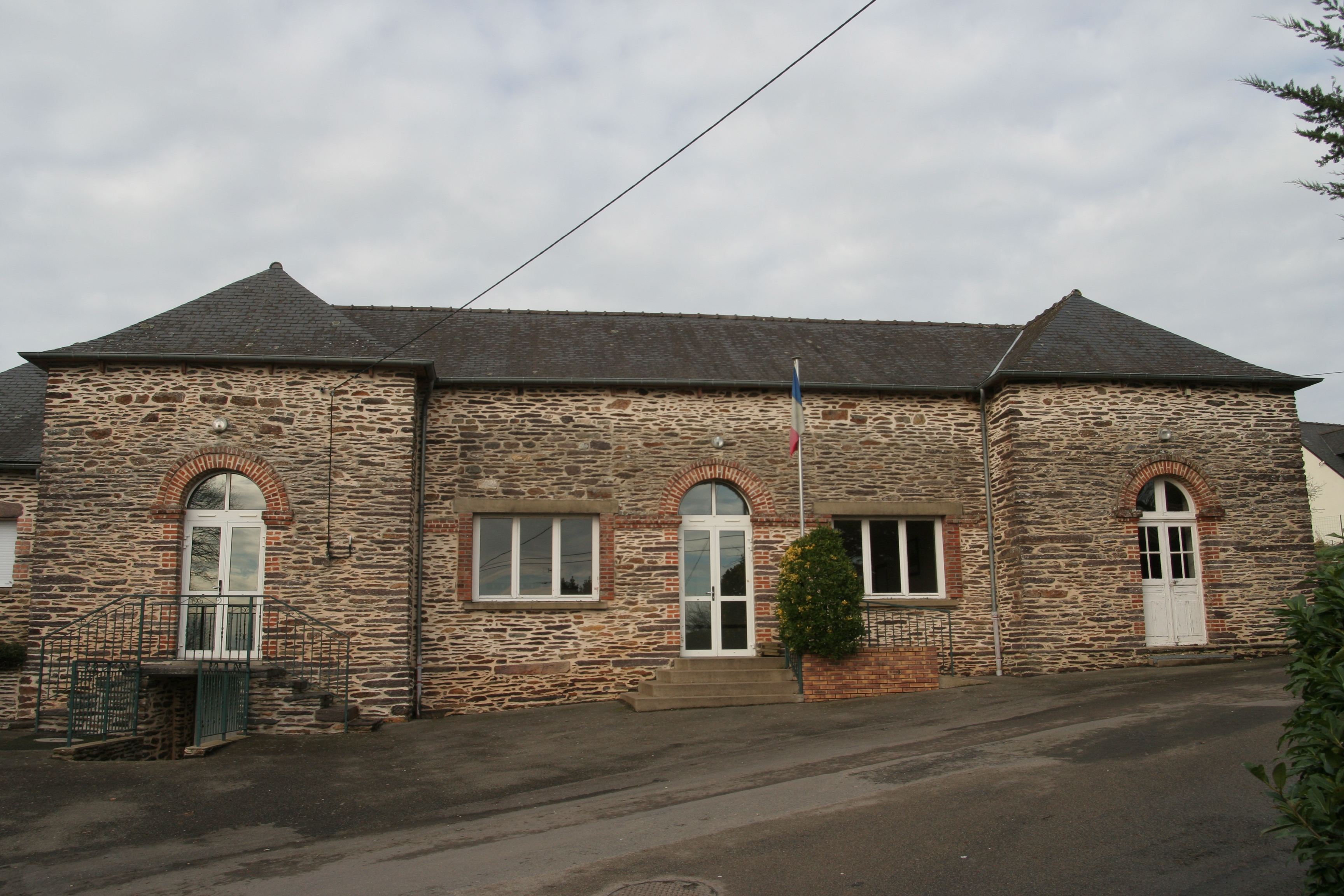 Mairie de Loutehel.